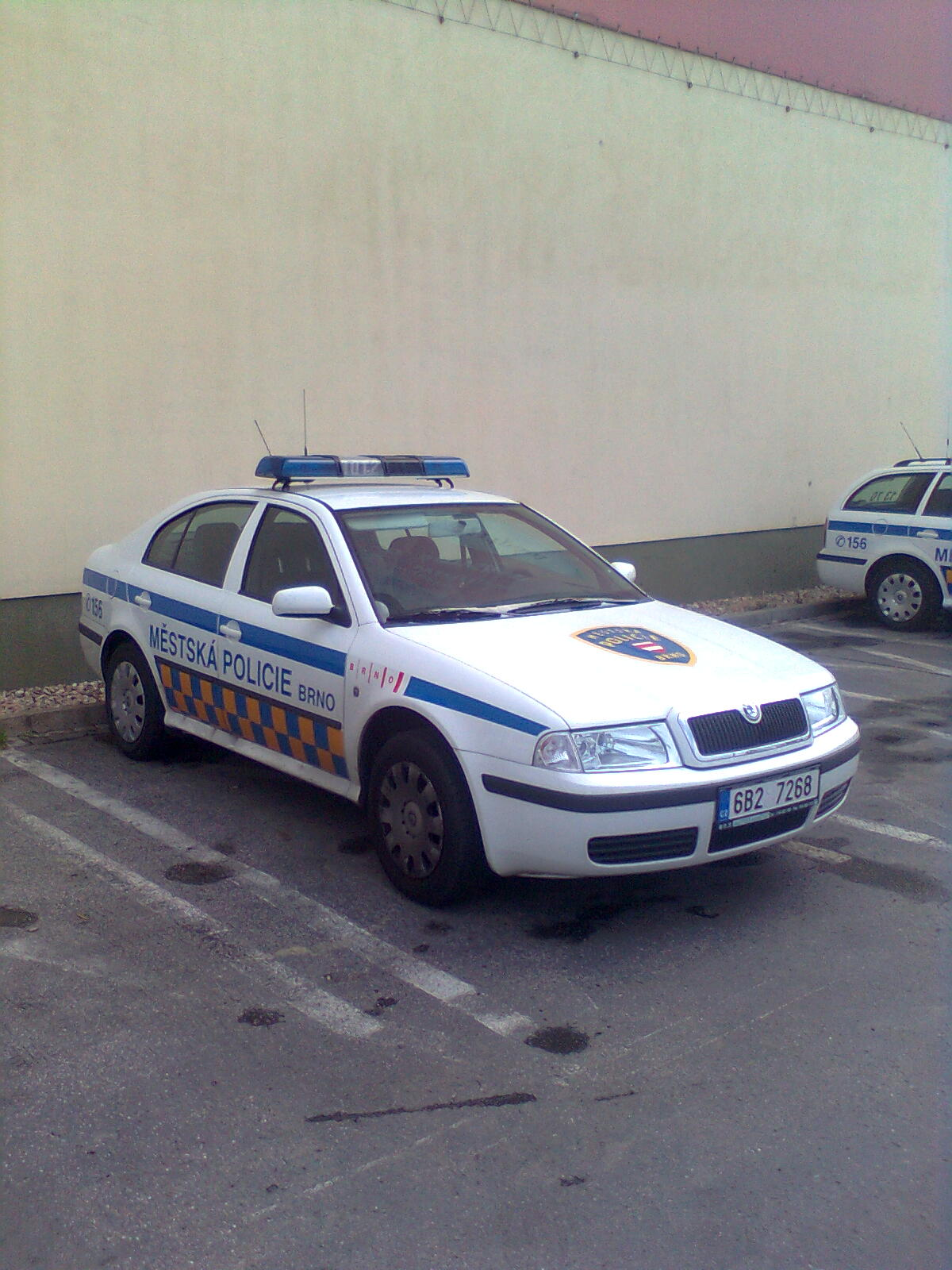 Auto Mestske policie Brno